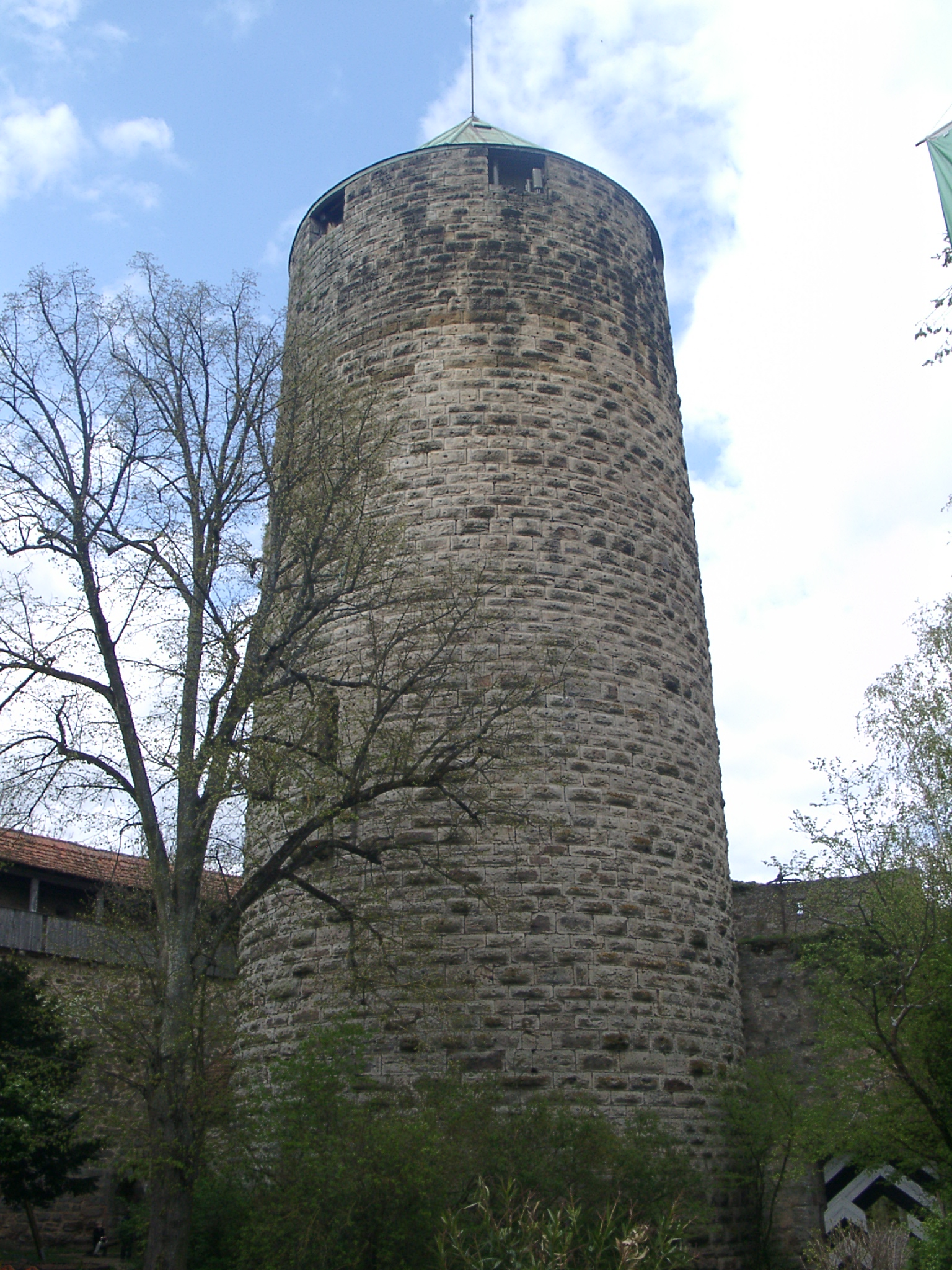 Burg Comlberg